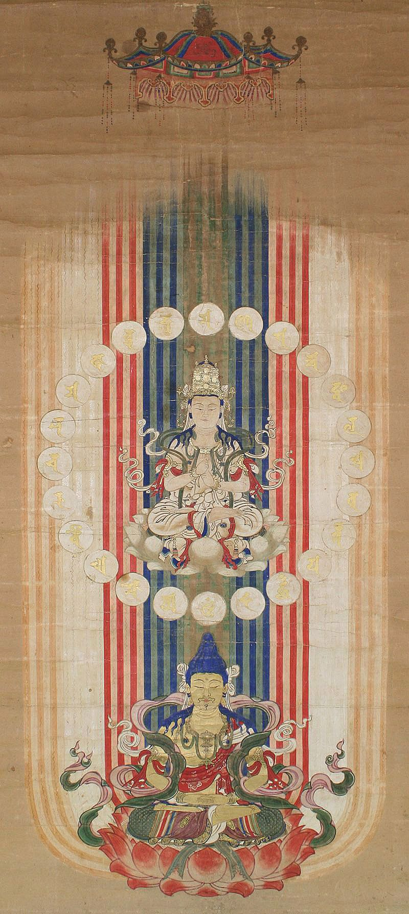 光明真言曼荼罗，江户时代，约17-18世纪。